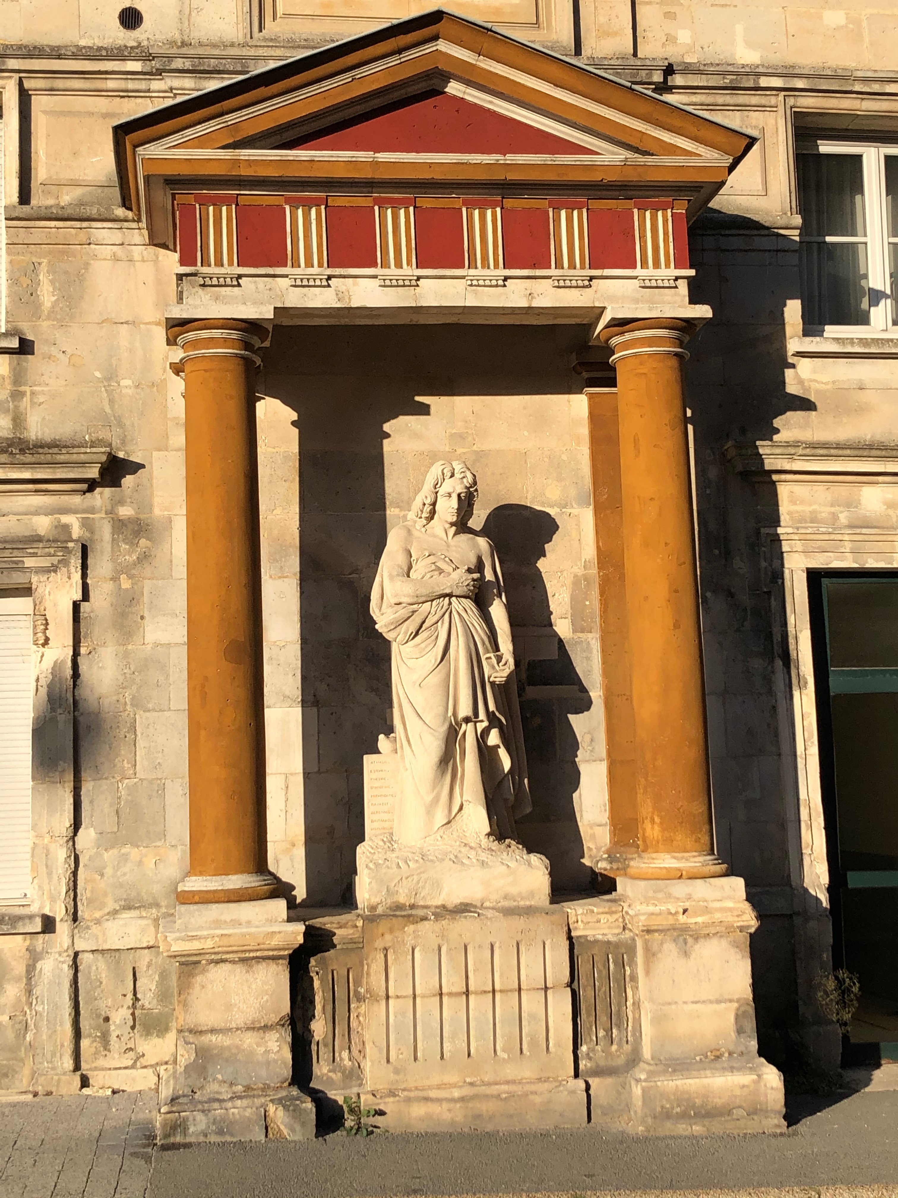 Satuaire de Jean Racine par David d'Angers et son portique peint lors des JEP 2019